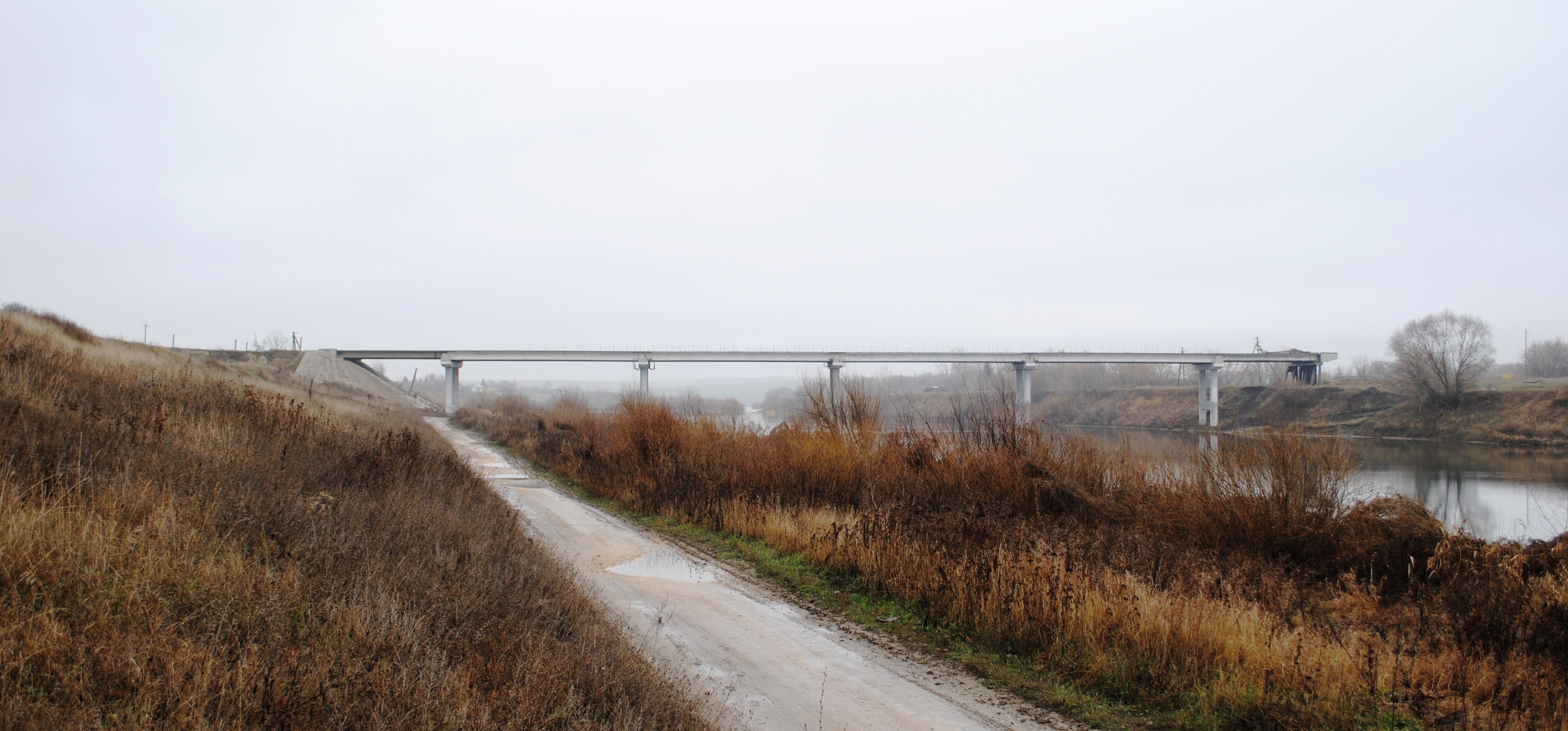 Мост через р.Сосну в Калинино